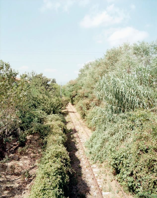 Veduta dell'ex tracciato della ferrovia Pontremolese tra Ponzano Magra e Sarzana.